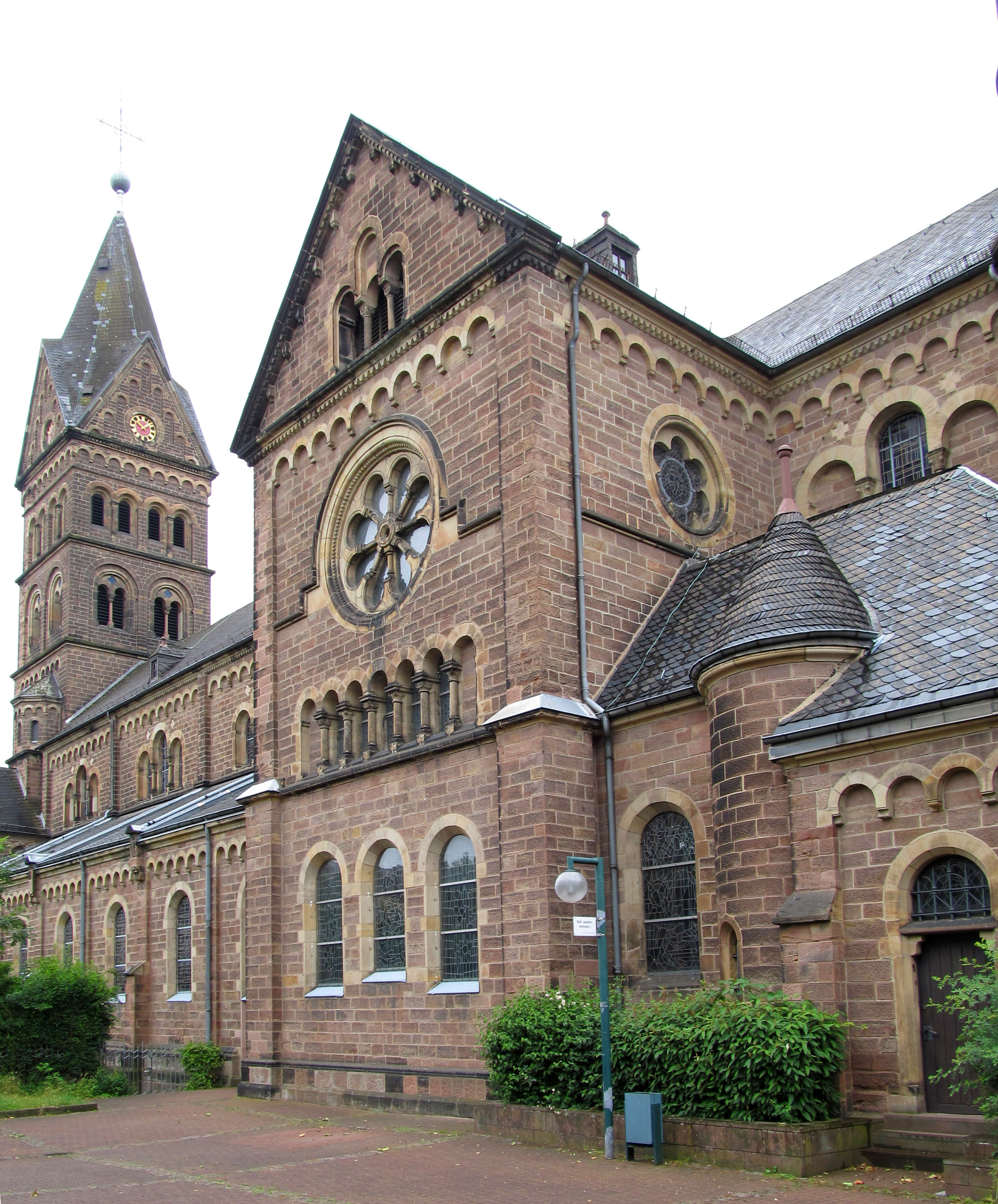 Südseite der katholischen Pfarrkirche St. Marien in Neunkirchen, Saarland